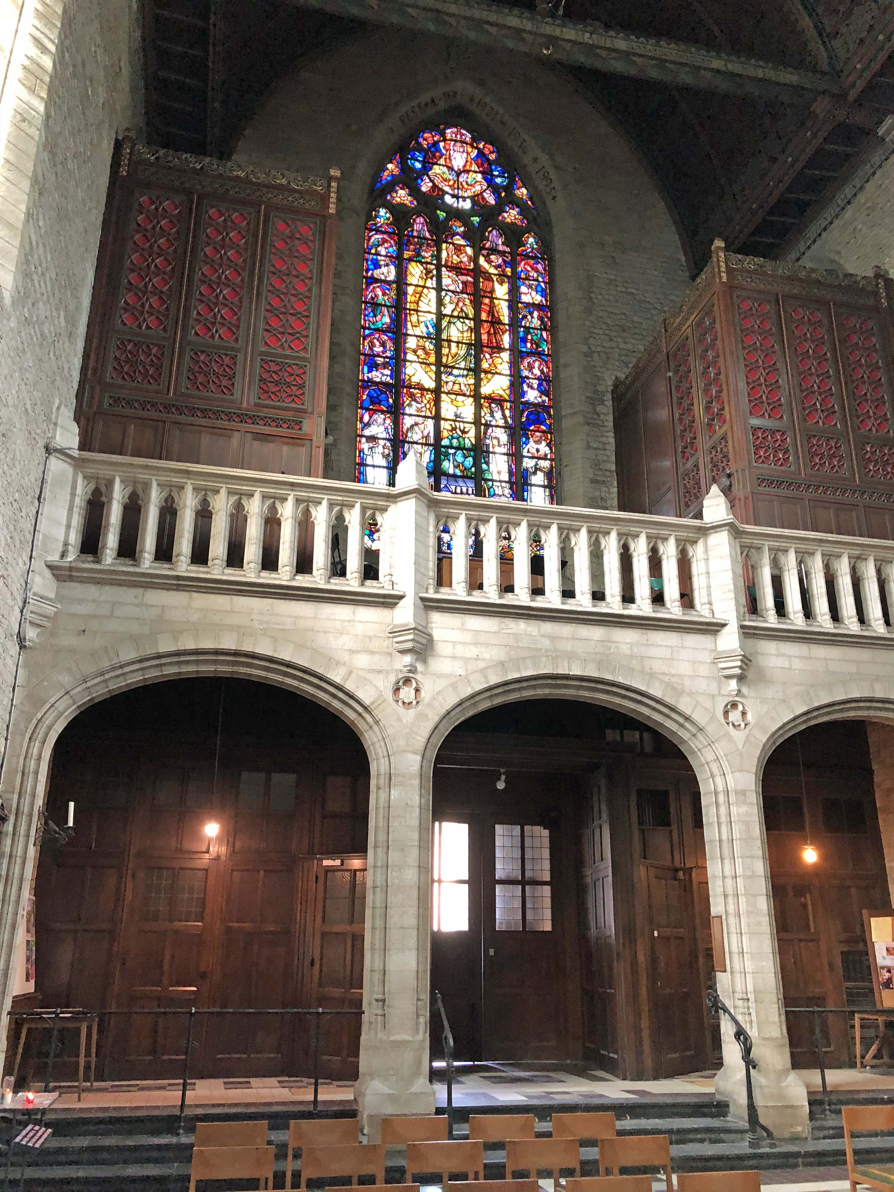 Jubé de l'abbaye de la cambre